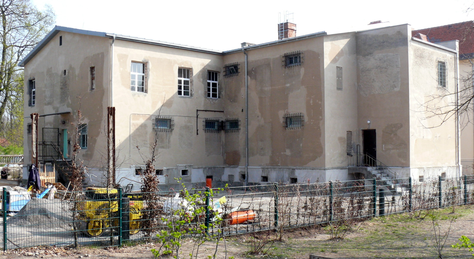 Ansicht von hinten.